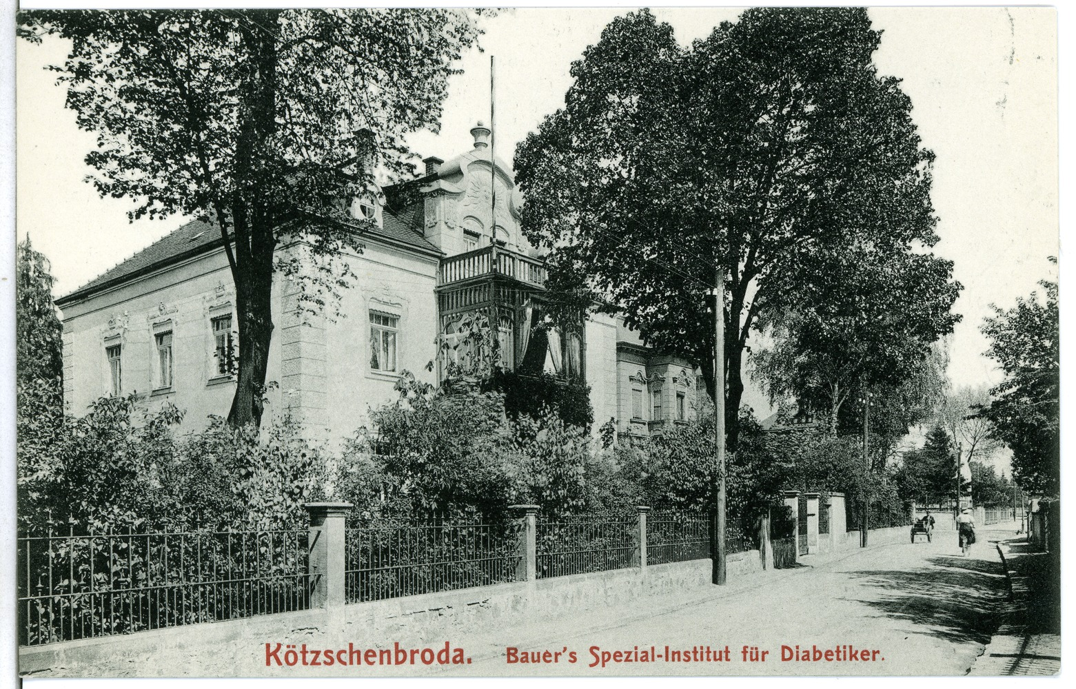 Radebeul; Kötzschenbroda - Bauers Spezialinstitut für Diabetiker This postcard is from publisher Brück & Sohn in Meißen ( postcard has a unique number 11035 and is available in a higher resolution at the publisher. This images was uploaded in a cooperation project between Wikipedians and the publisher.